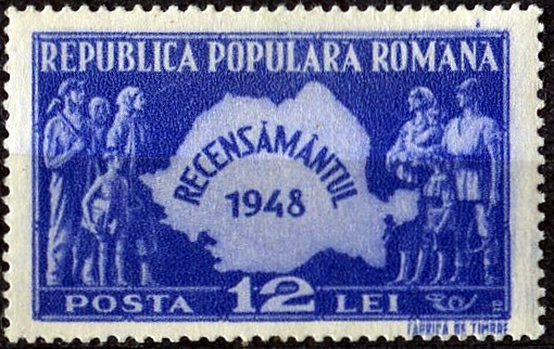 Recensamantul din 1948